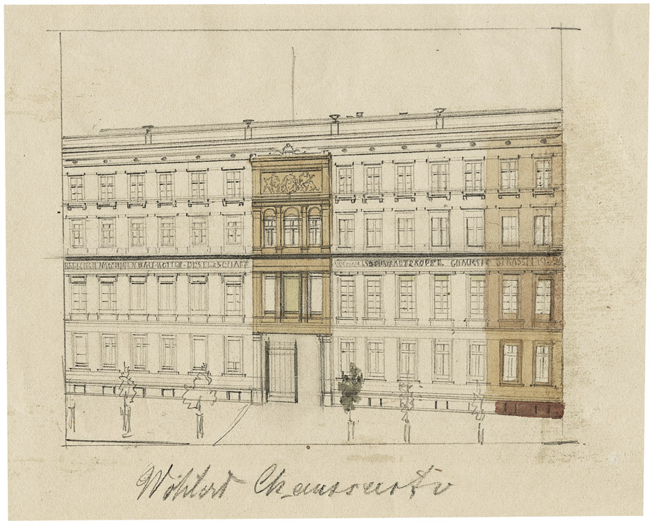 Klassizistisches Verwaltungsgebäude der Berliner Maschinenbau Actien-Gesellschaft vormals L. Schwartzkopff (BMAG), Chausseestr. 19-20, Berlin (an der Ostseite Chaussee-Straße zwischen Invaliden- und Zinnowitzerstraße)